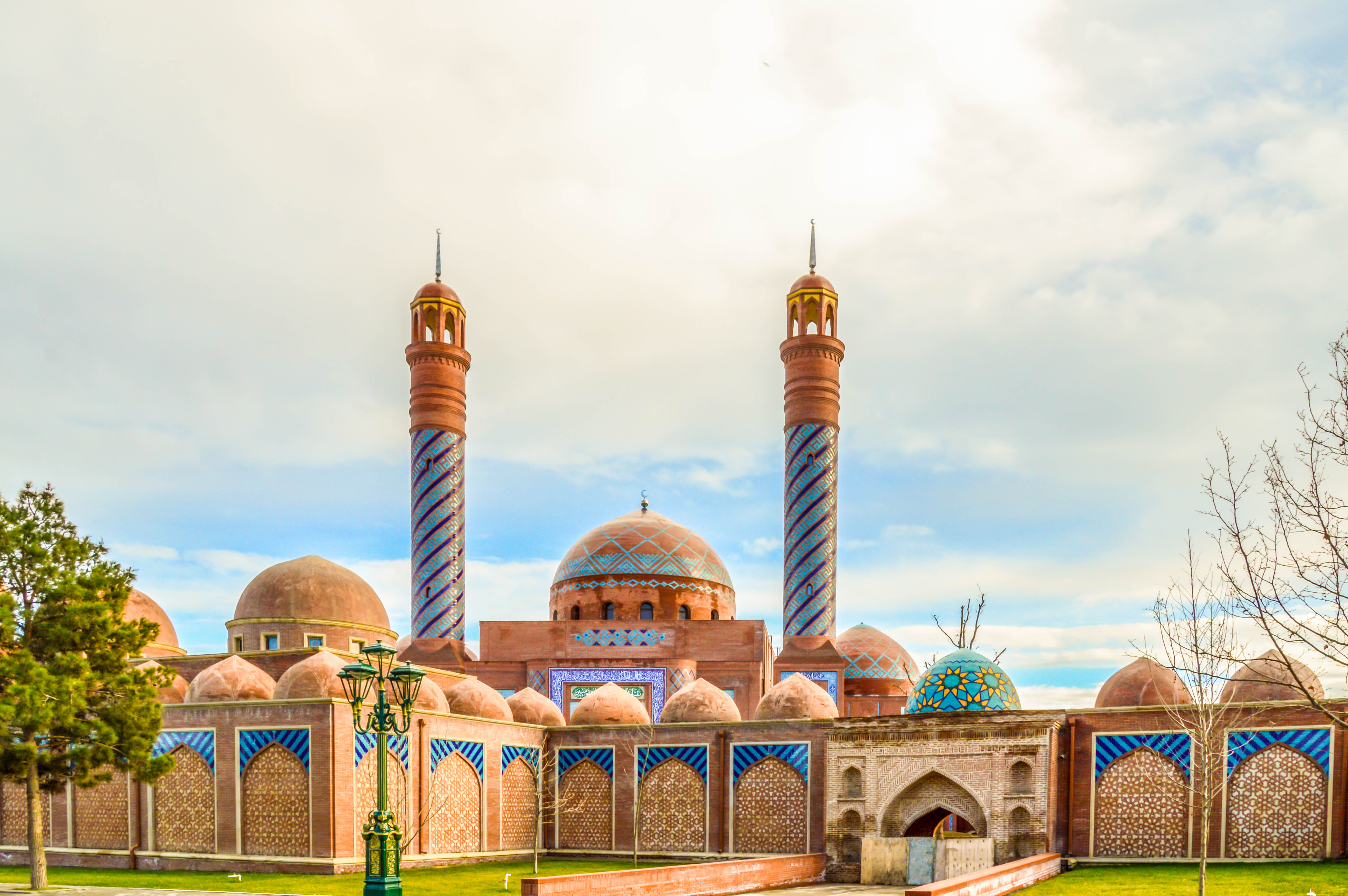 İmamzadeh complex in Ganja